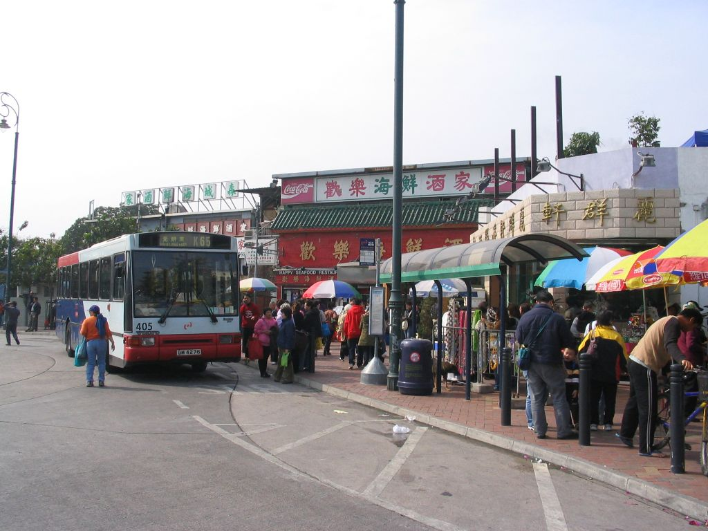 流浮山-流浮山道深灣路迴旋處。 Lau Fau Shan Road & Deep Bay Road, Lau Fau Shan